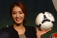 2013년 11월 19일 CGV 청담 씨네시티에서 열린 축구 시뮬레이션 게임 '풋볼데이' 발표 행사인 '풋볼데이 쇼'에 참가한 정인영.